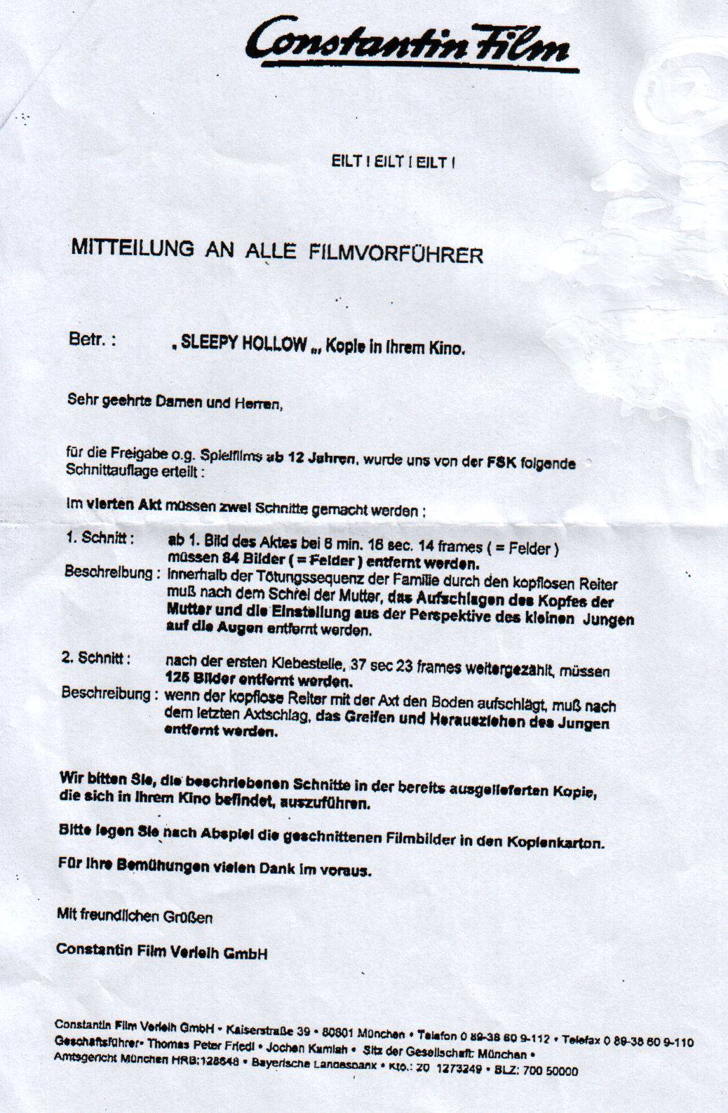 Schnittanweisung